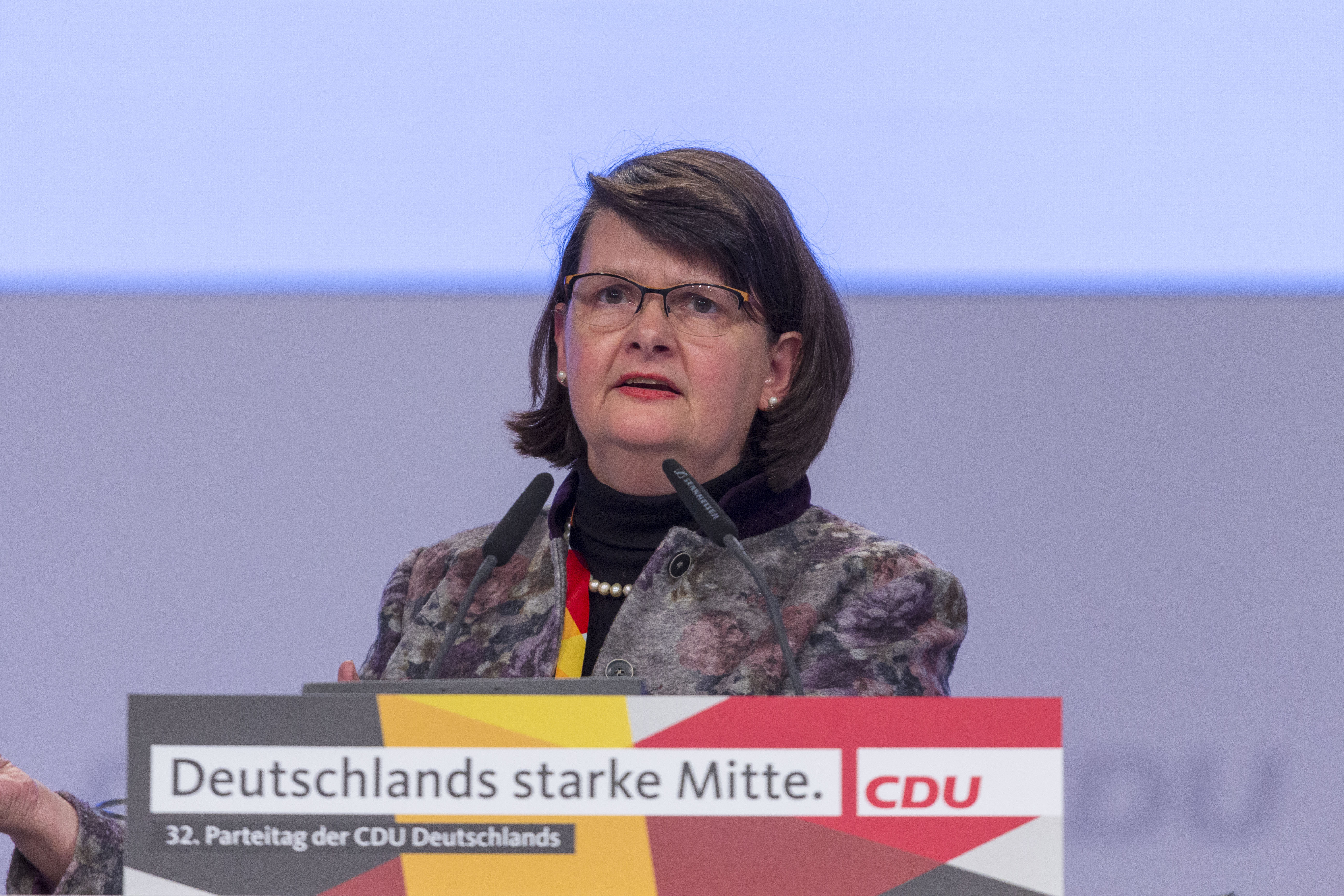 Maria Flachsbarth auf dem CDU Parteitag 2019 am 23. November 2019 in Leipzig.